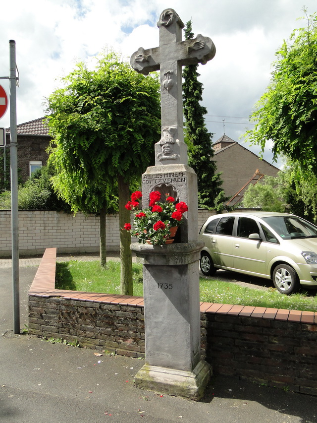 Das Wegekreuz wurde 1735 errichtet und befindet sich an der Ecke Oberdorf- und Abtstraße. Inschrift: Über der Muschelnische: ALLES MINEM GOTT ZU EHREN; Die fast ganz verwitterte Inschrift beginnt: 1735